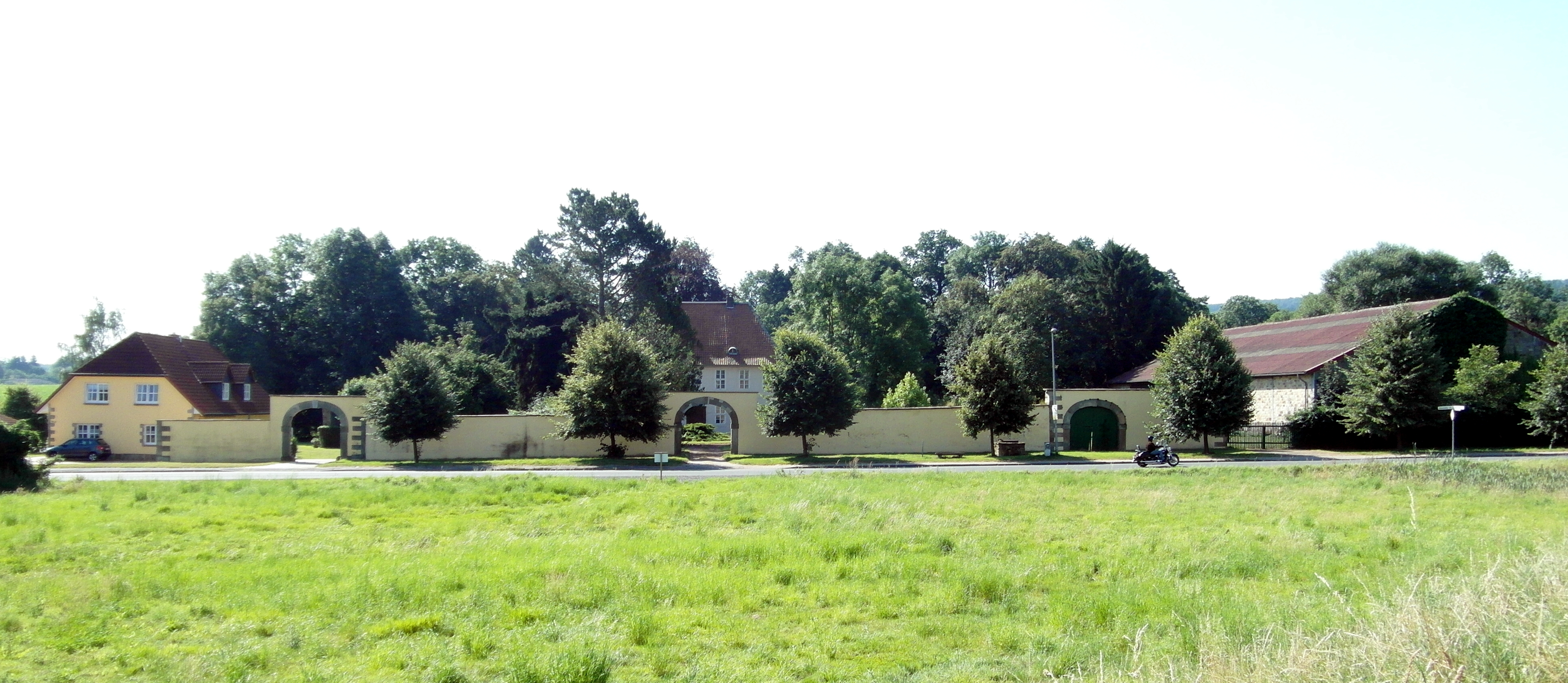 Das Obergut in der Nienstedter Straße in Egestorf (Stadt Barsinghausen)